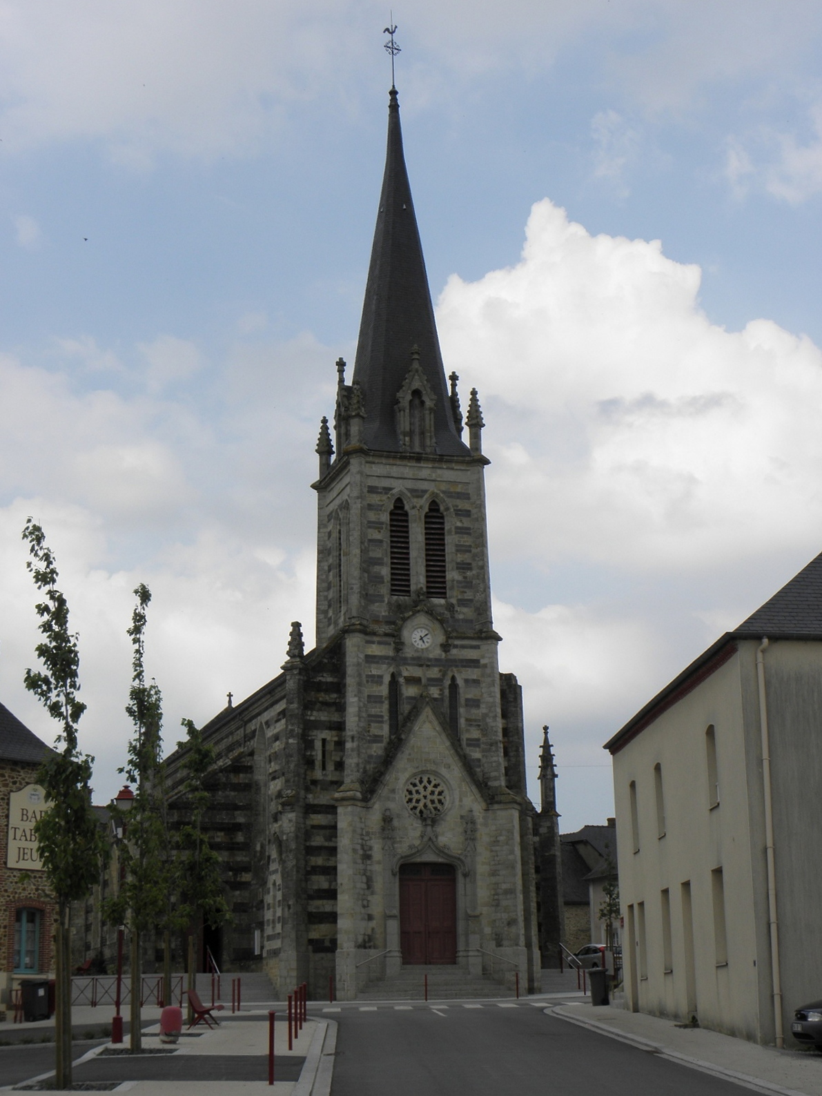 Église paroissiale de Saint-Germain-du-Pinel (35).